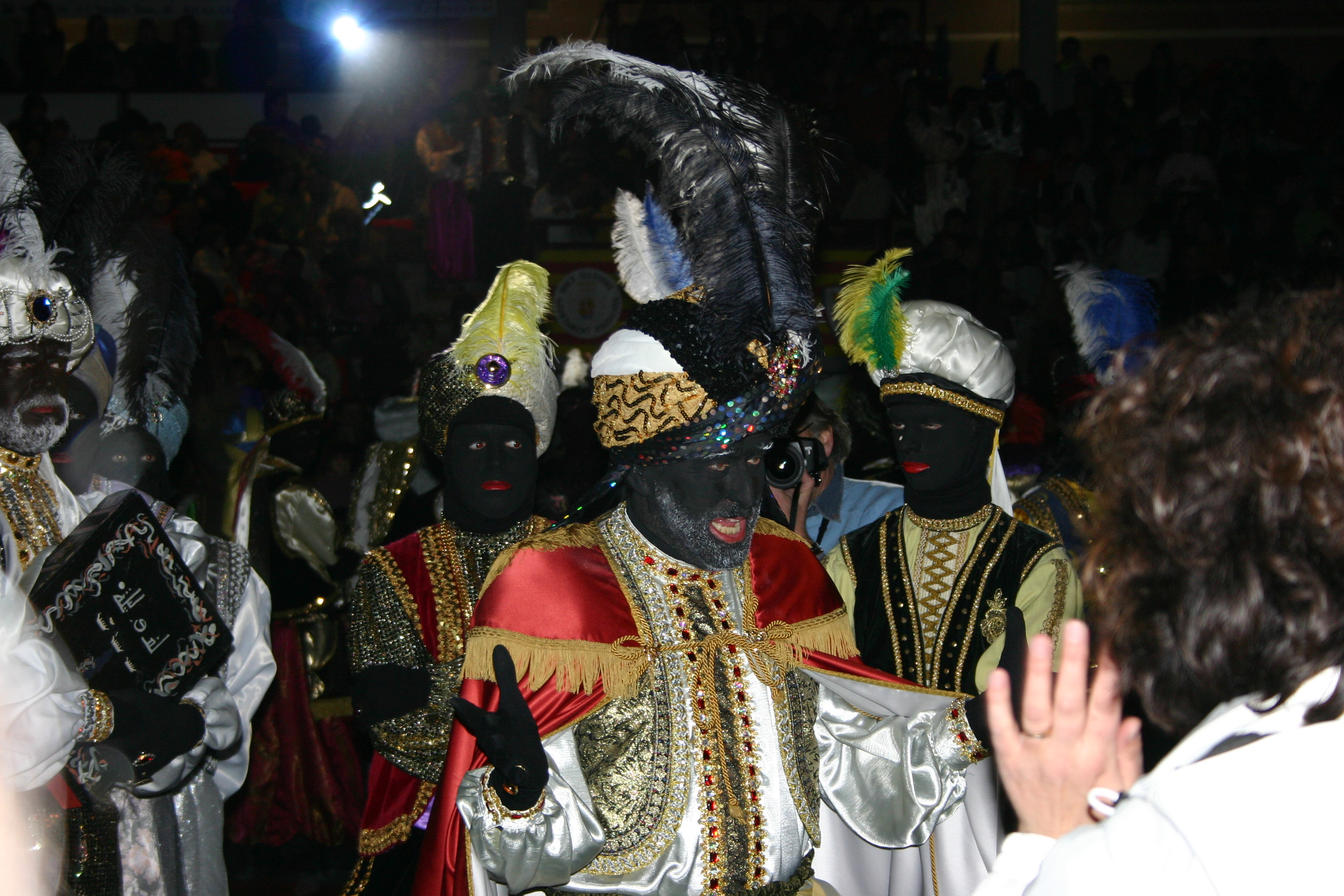 Patge Faruk, emissari a Igualada (Barcelona, Catalonia) dels Tres Reis Mags. Author: bernatff